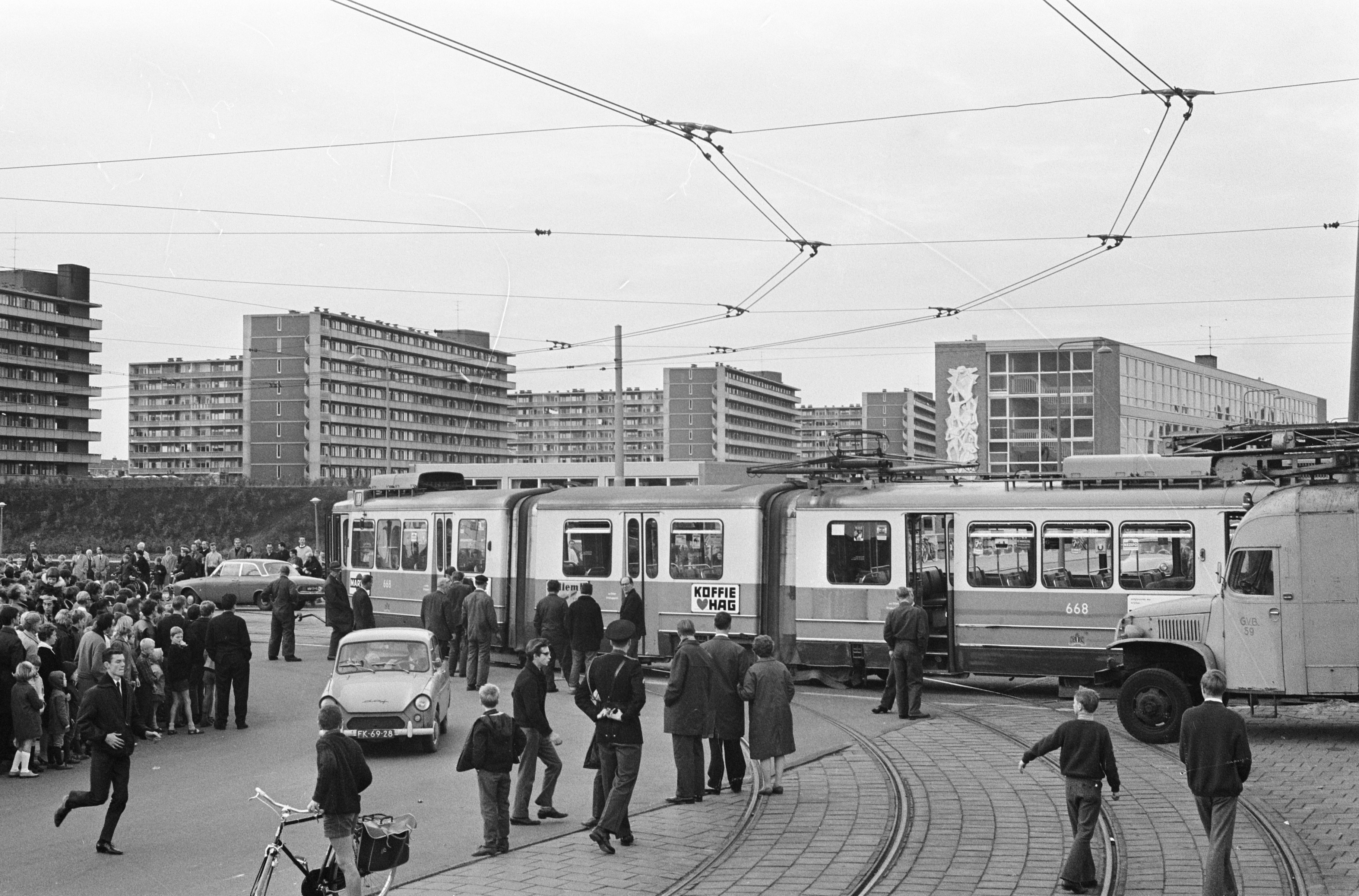 Collectie / Archief : Fotocollectie Anefo Reportage / Serie : [ onbekend ] Beschrijving : Lijn 17 op hoek Osdorpplein en Meer en Vaart uit de rails Datum : 22 oktober 1966 Trefwoorden : trams Fotograaf : Steinmeier, Hans / Anefo Auteursrechthebbende : Nationaal Archief Materiaalsoort : Negatief (zwart/wit) Nummer archiefinventaris : bekijk toegang 2.24.01.05 Bestanddeelnummer : 919-7074